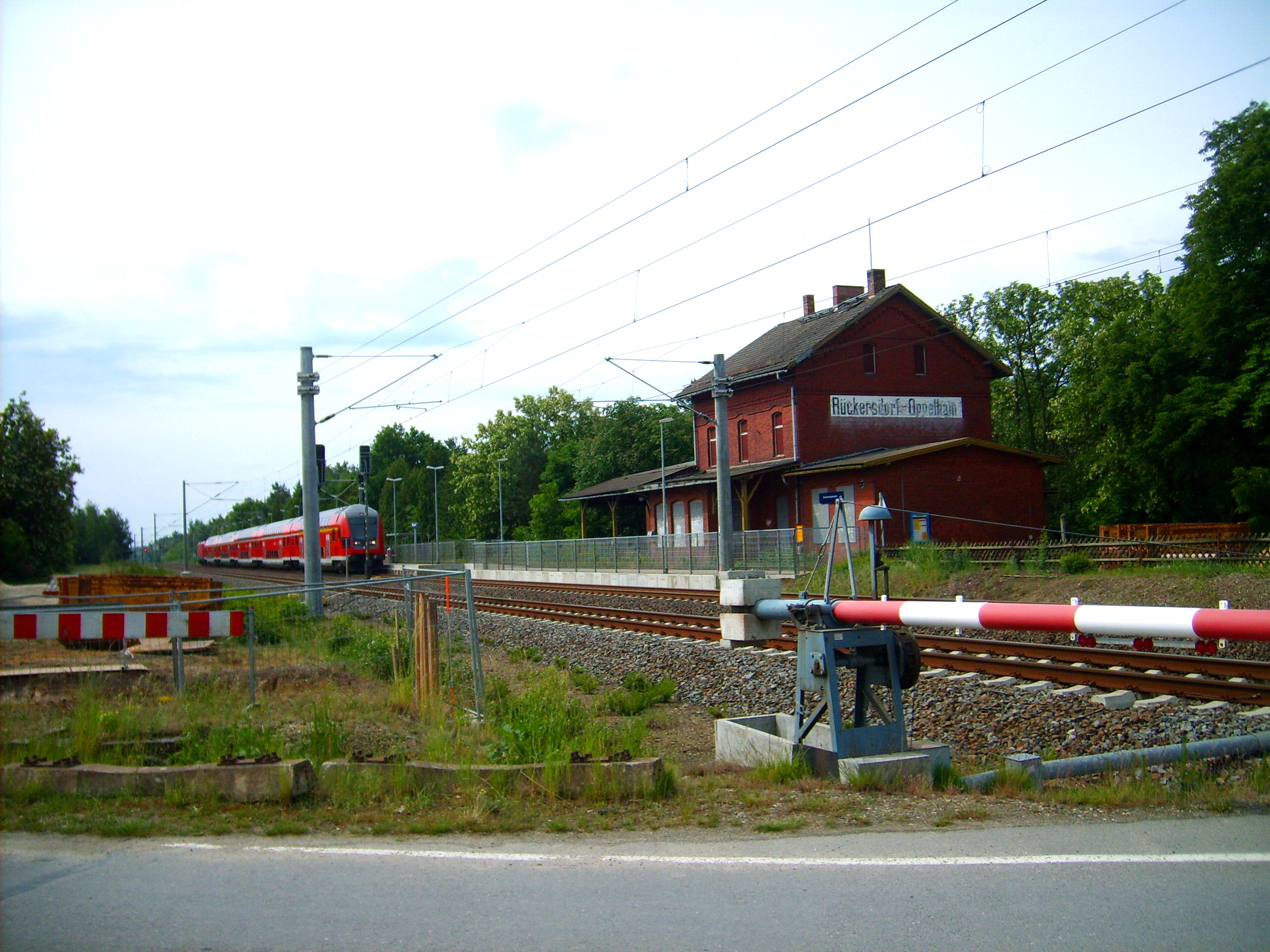 Bahnhof Rückersdorf-Oppelhain